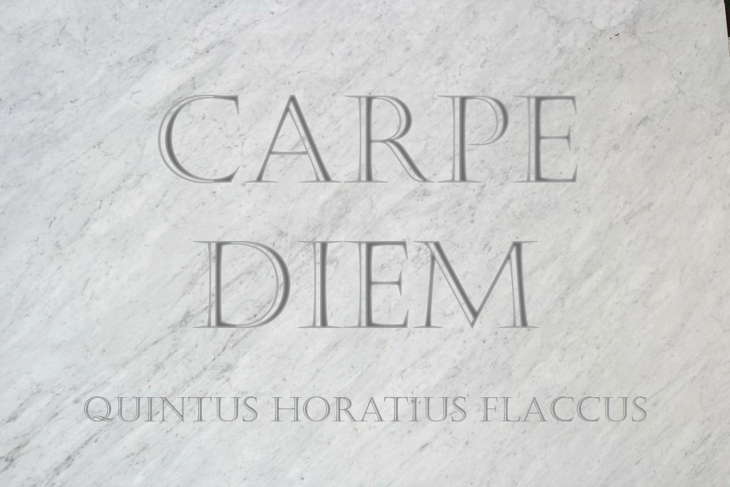 Carpe diem - «Лови день».